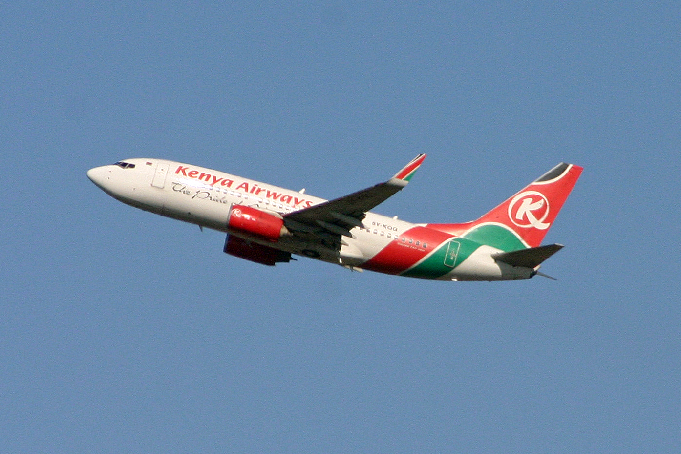 msn 32371, l/n 2718